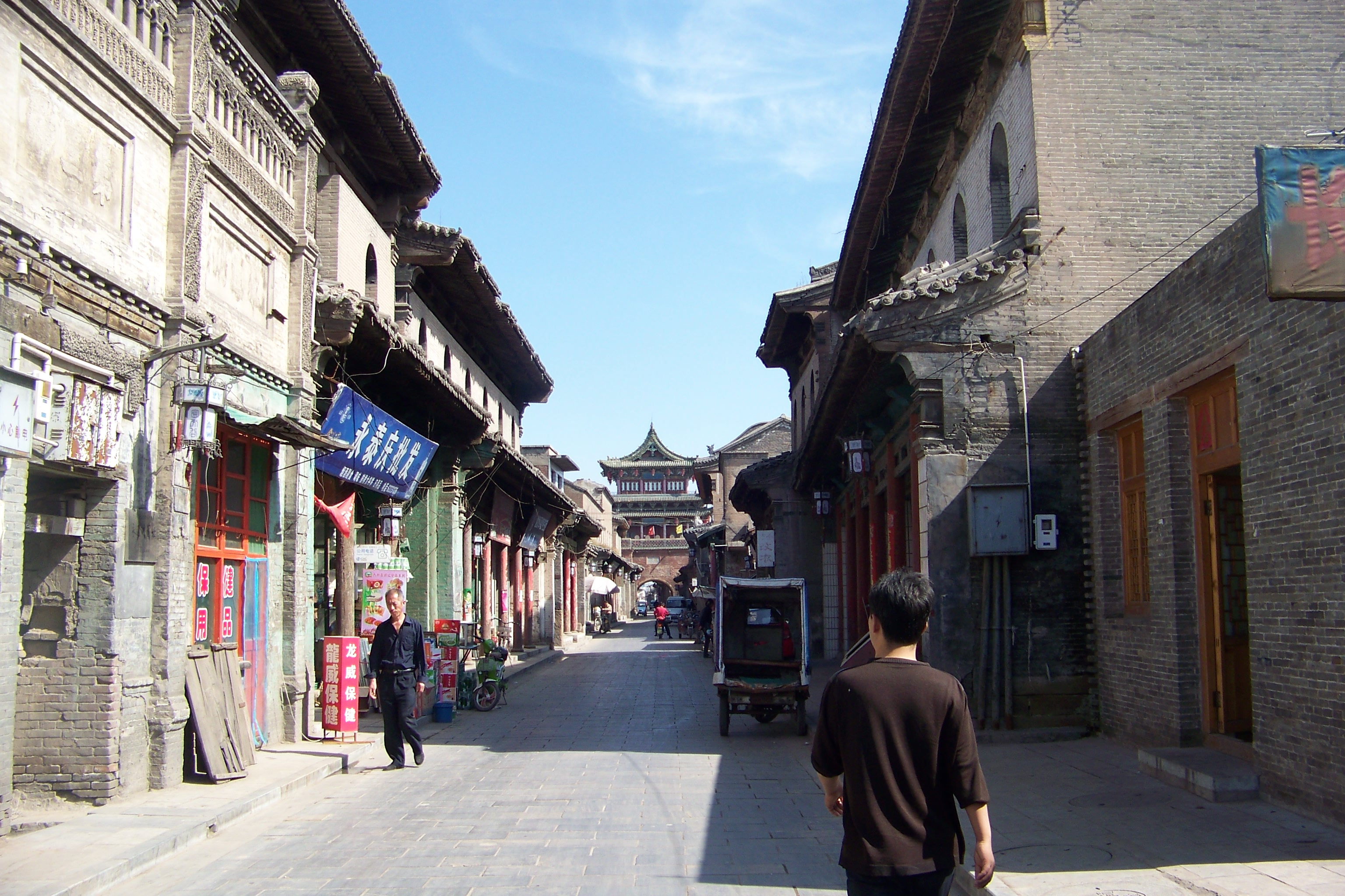 太谷县城西街